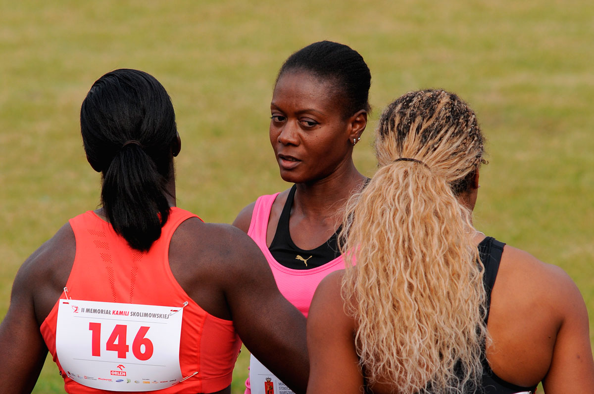 Merlene Ottey po biegu na 100m podczas 2 Memoriału Kamili Skolimowskiej w Warszawie.